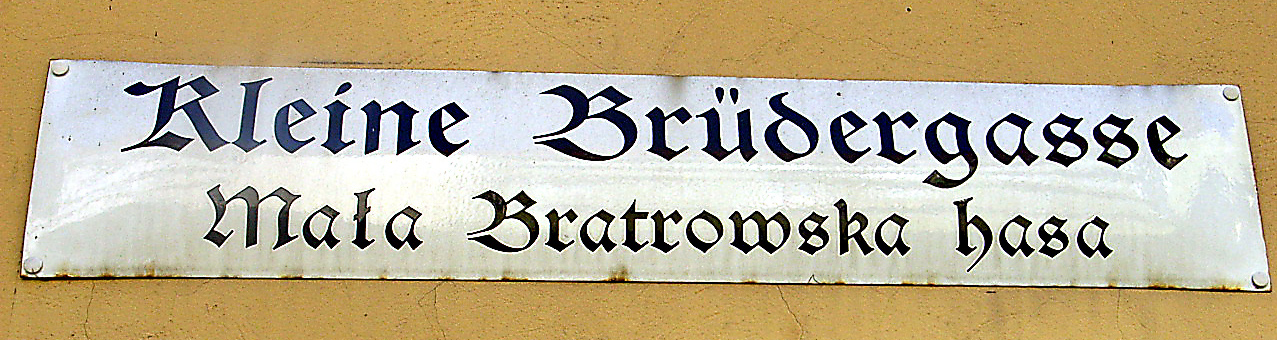 Zweisprachiges Straßenschild in Bautzen mit Deutsch und Obersorbisch. Sorbisch-deutsches Straßenschild in der Innenstadt von Bautzen. Gàidhlig: Sanas rathaid dà chànanach ann am Bautzen anns a' Ghearmailtis is Sorbais.